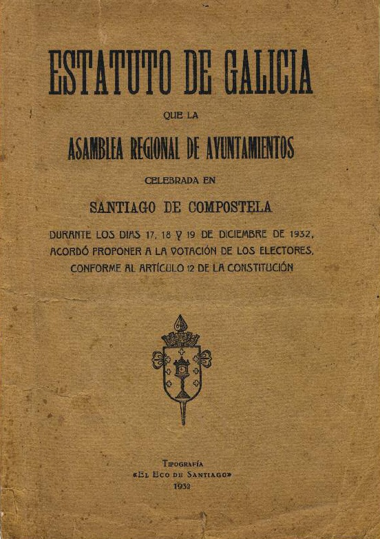 Portada del Estatuto de Autonomía de Galicia de 1936.